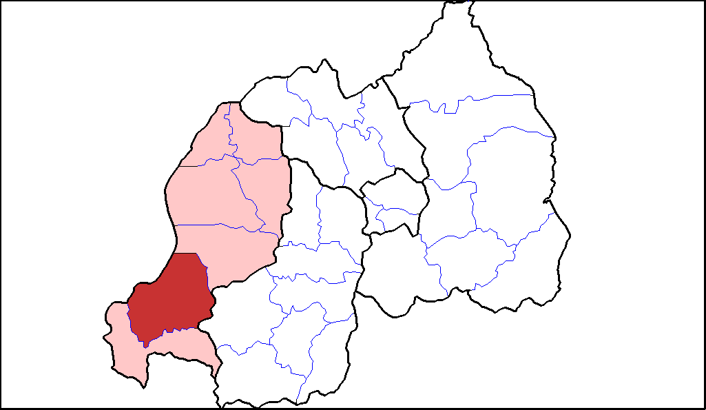 Nyamasheke innerhalb der Westprovinz.